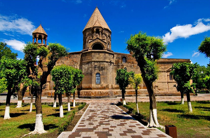 Эчмиадзинский Кафедральный Собор, Армения.